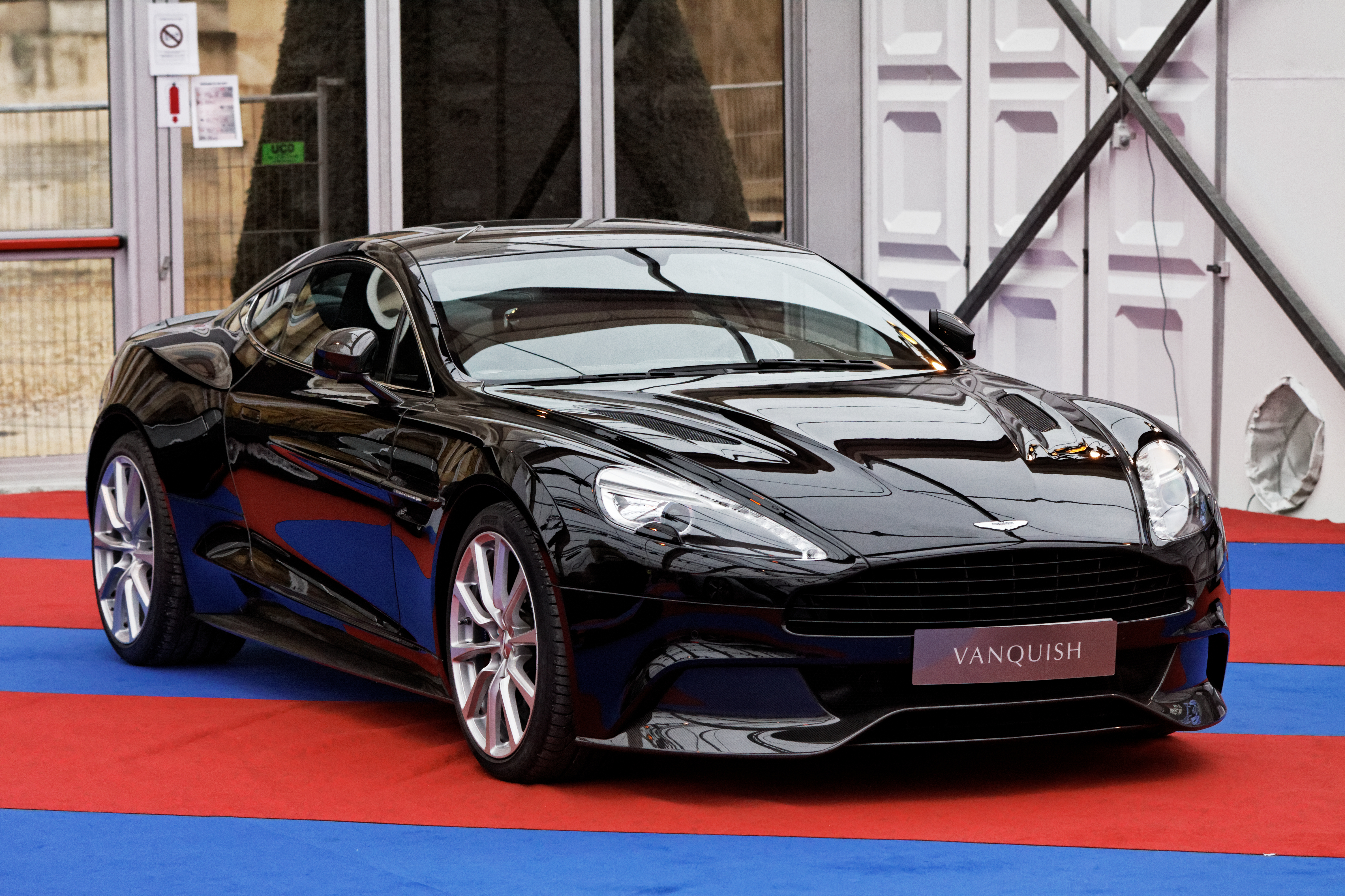 Une Aston Martin Vanquish exposée lors du festival automobile international 2013.